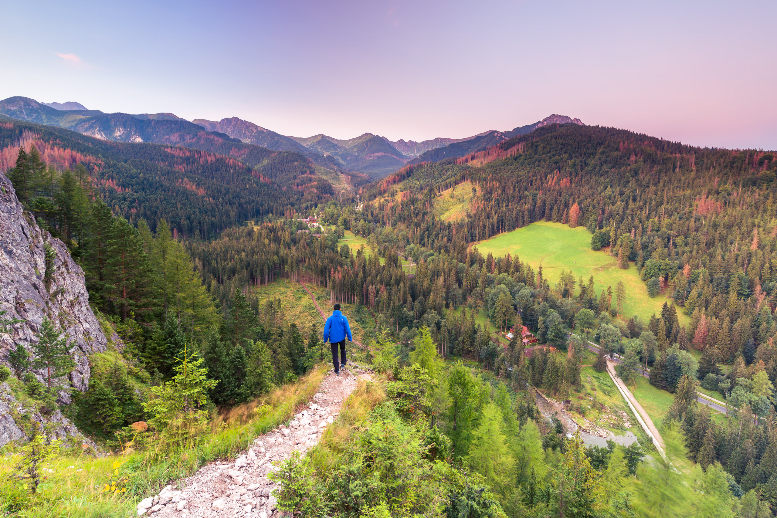 Tatry, Nosal This is a photography of protected area with CRFOP ID PL.ZIPOP.1393.N2K.PLC120001.B